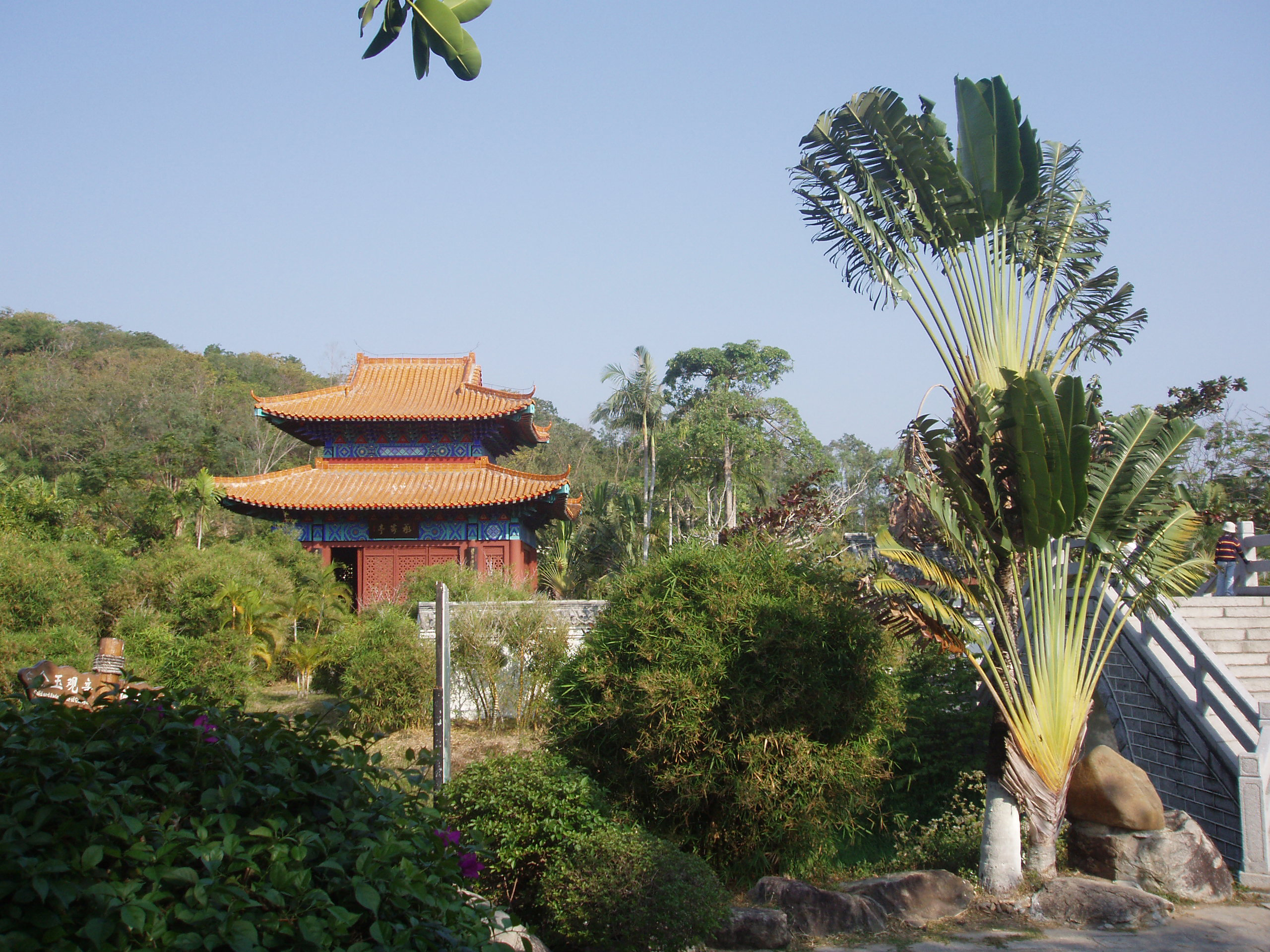 Nanshan Temple (南山寺) in Sanya, Hainan, China